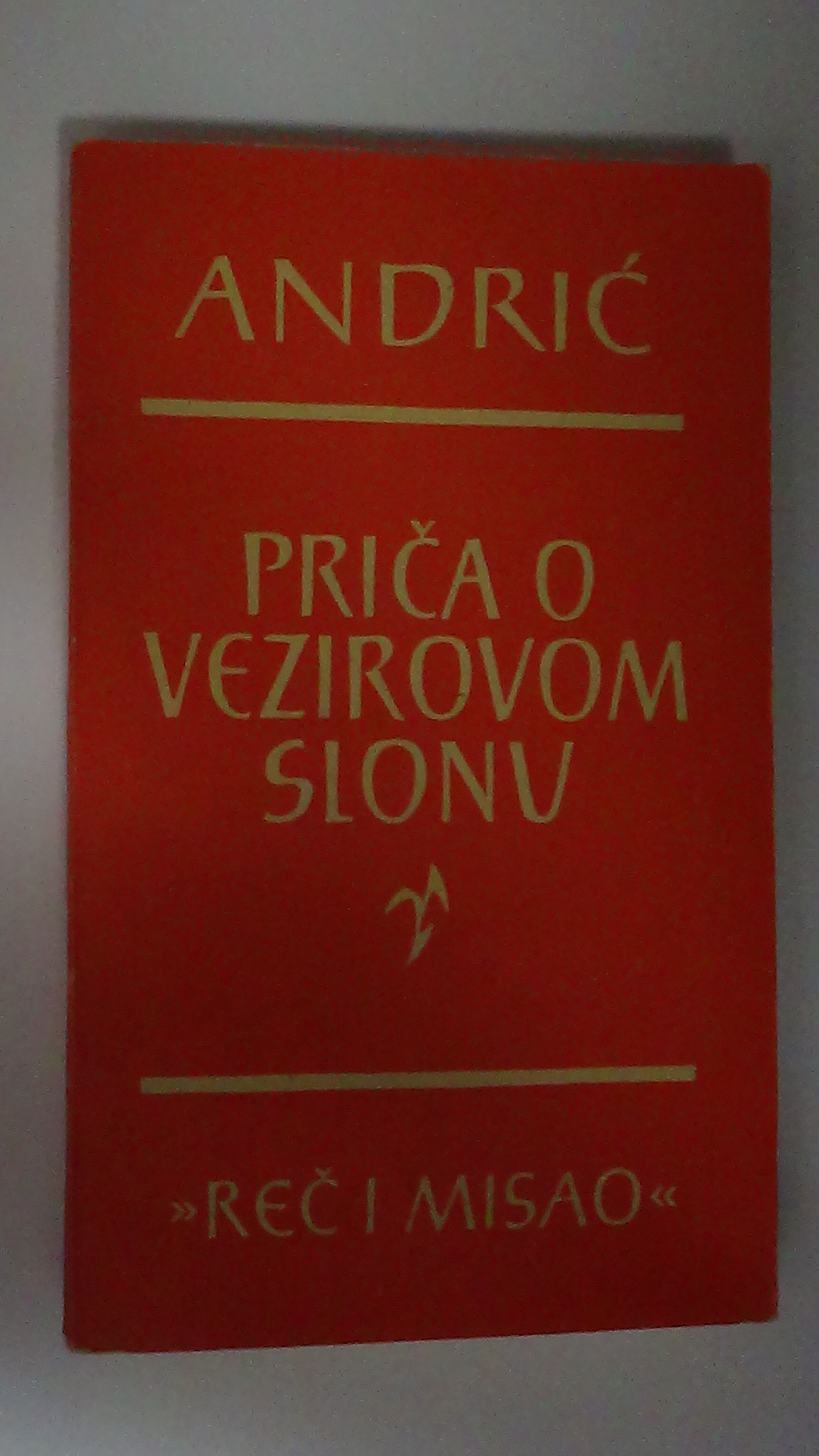 „Приказна за везировиот слон“, Рад, Белград, 1962.